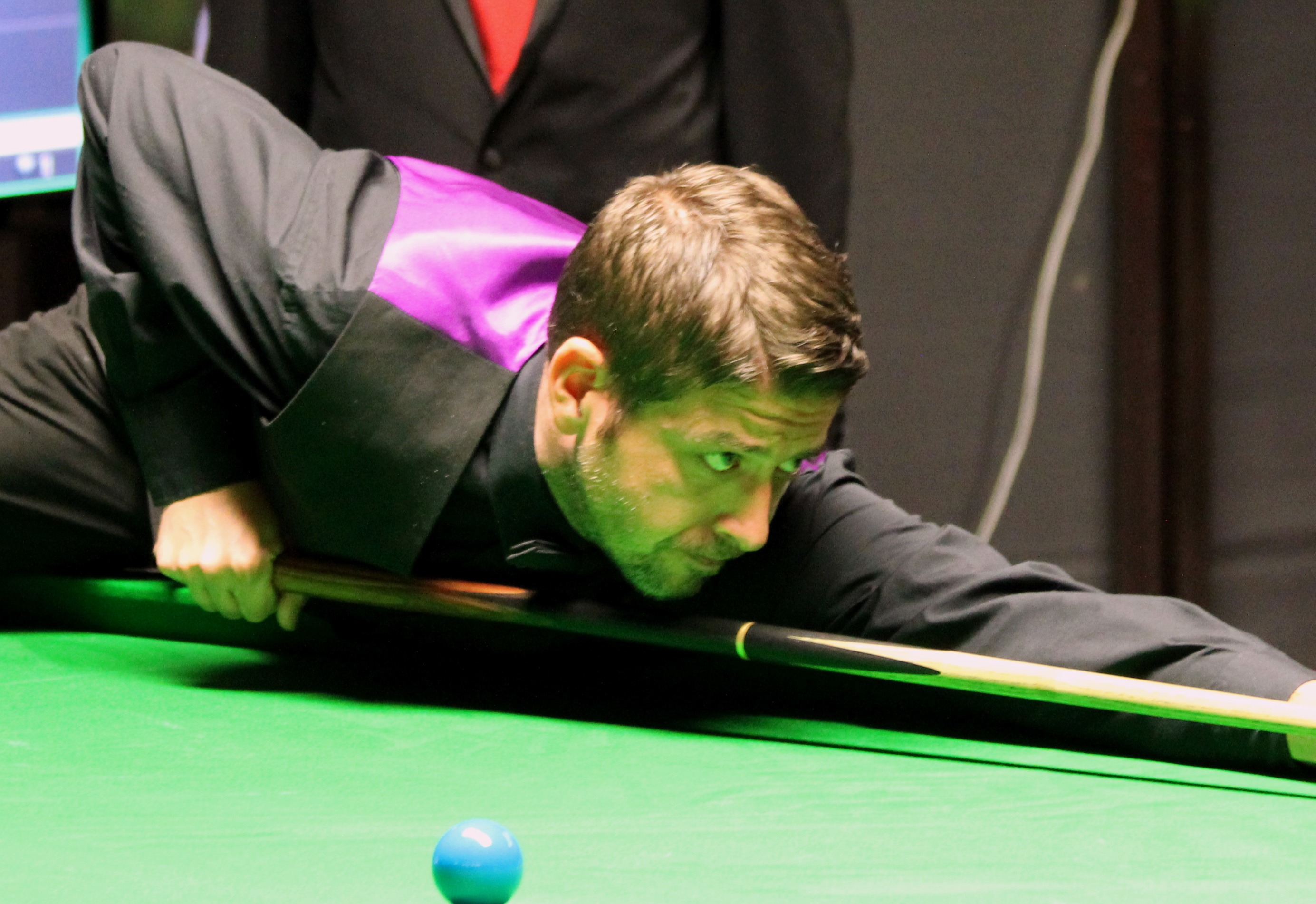 Matthew Stevens beim Paul Hunter Classic 2016